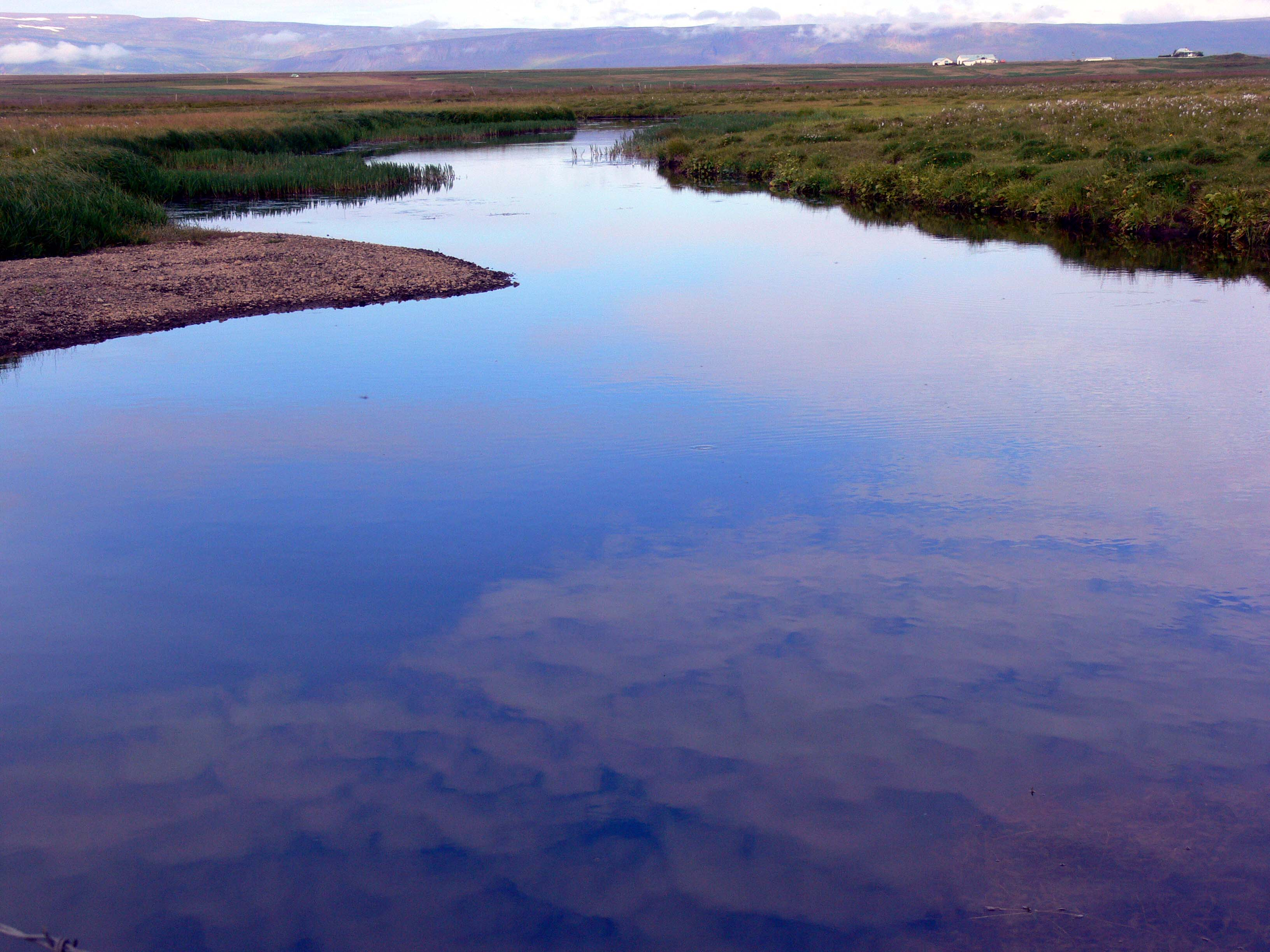 Vatnsdalur. Das Flüsschen Álfar.